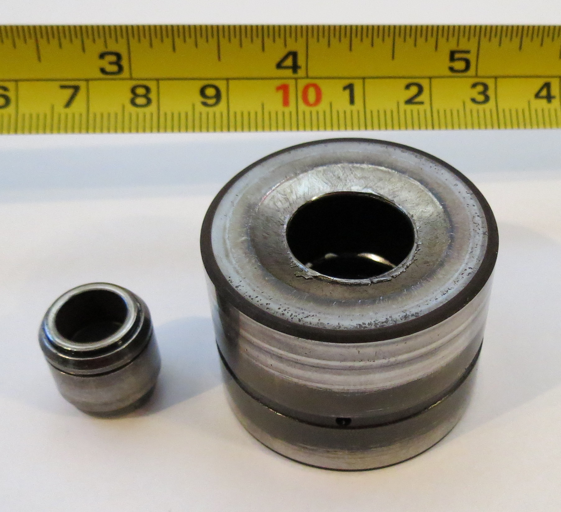 Zerstoerter Hydrostoessel aus einem VW Polo 6N mit 1,0 ALL Motor. Defekt trat bei rund 166.000 km auf. Hydrostoessel in Fahrtrichtung ganz links aussen.